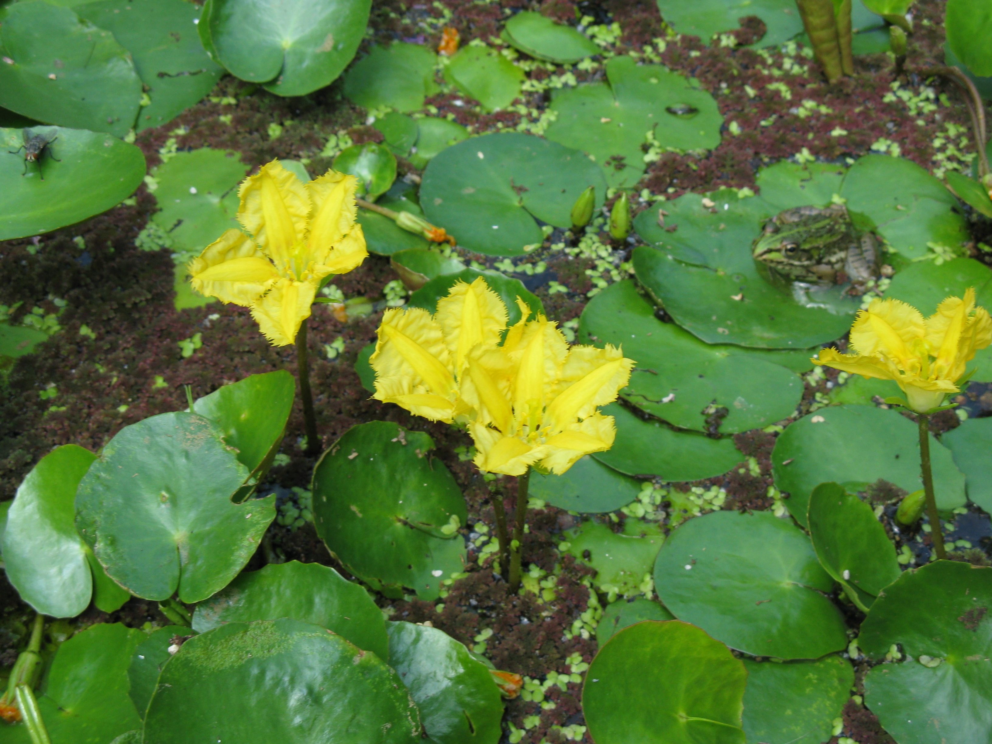 Nymphoides peltata